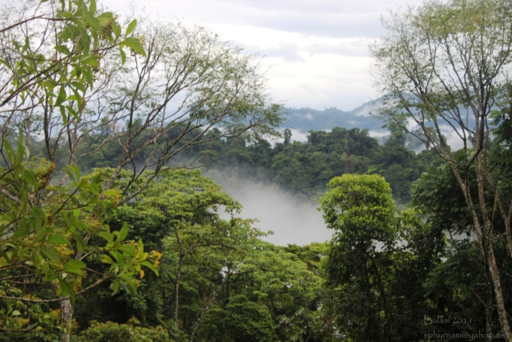 zona núcleo de la reserva del hombre y la biosfera del Río Plátano, Honduras. This is an image of the Biosphere Reserve: Río Plátano Biosphere Reserveh